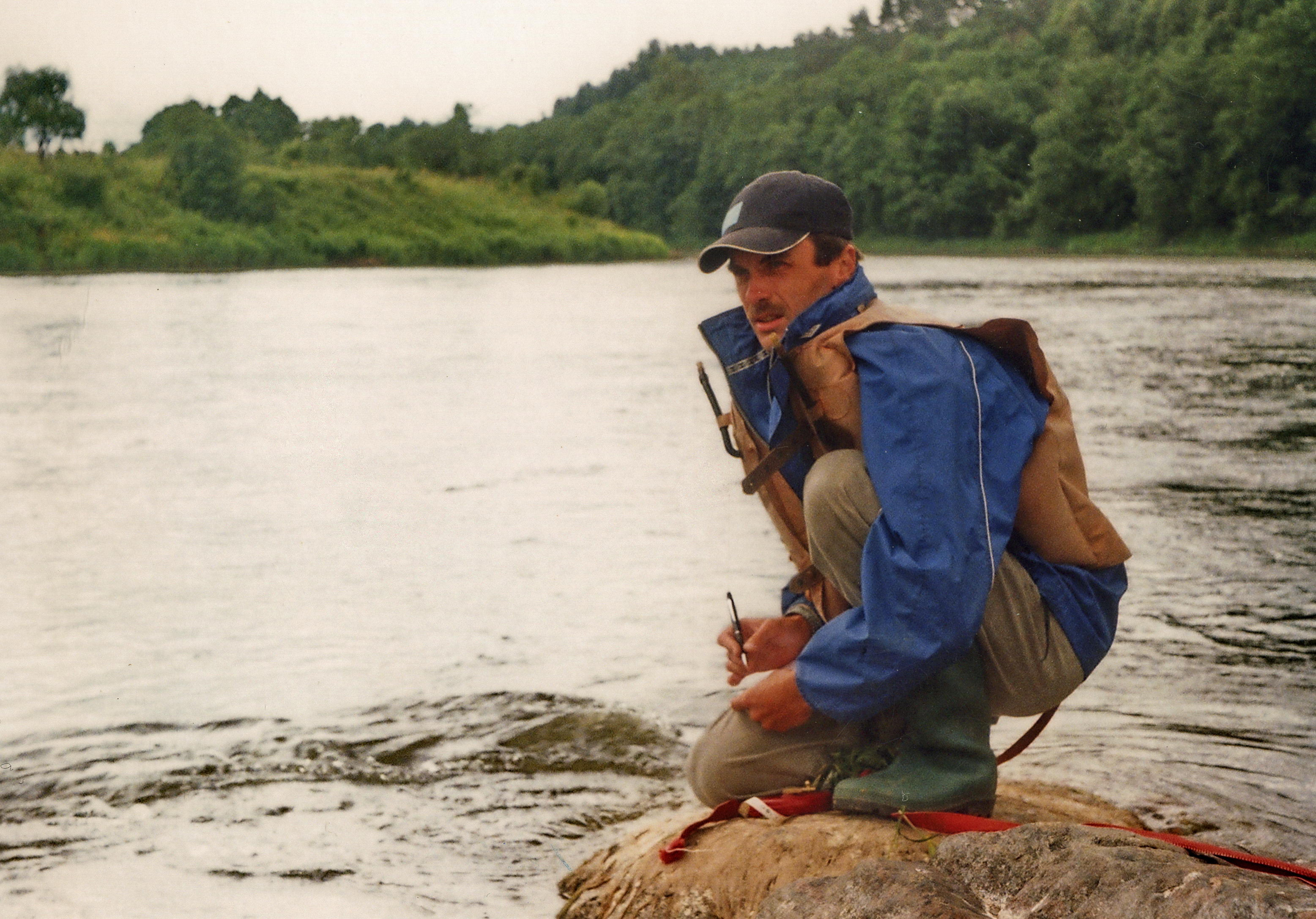 Neries ekspedicijos akimirka (2007)